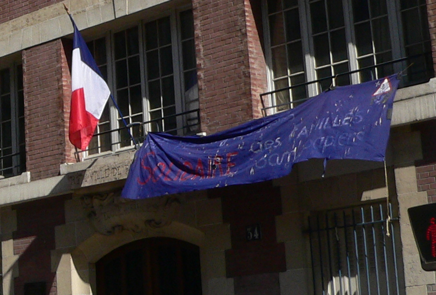 Dans ce quartier multiethnique de Paris, à deux pas du siège de campagne de Nicolas Sarkozy, une école primaire affiche son soutien aux sans-papiers